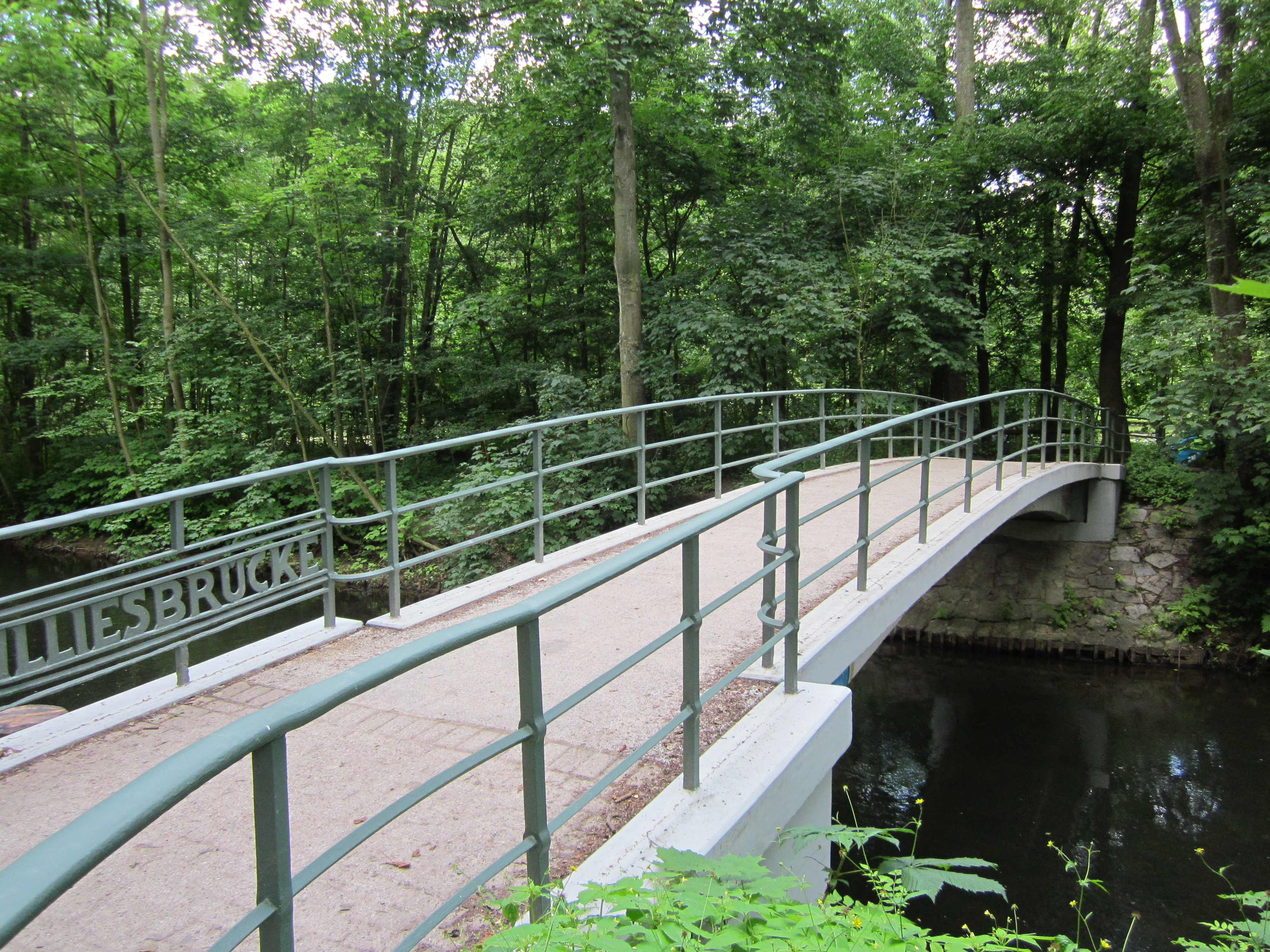 Die Illiesbrücke über die Alster.